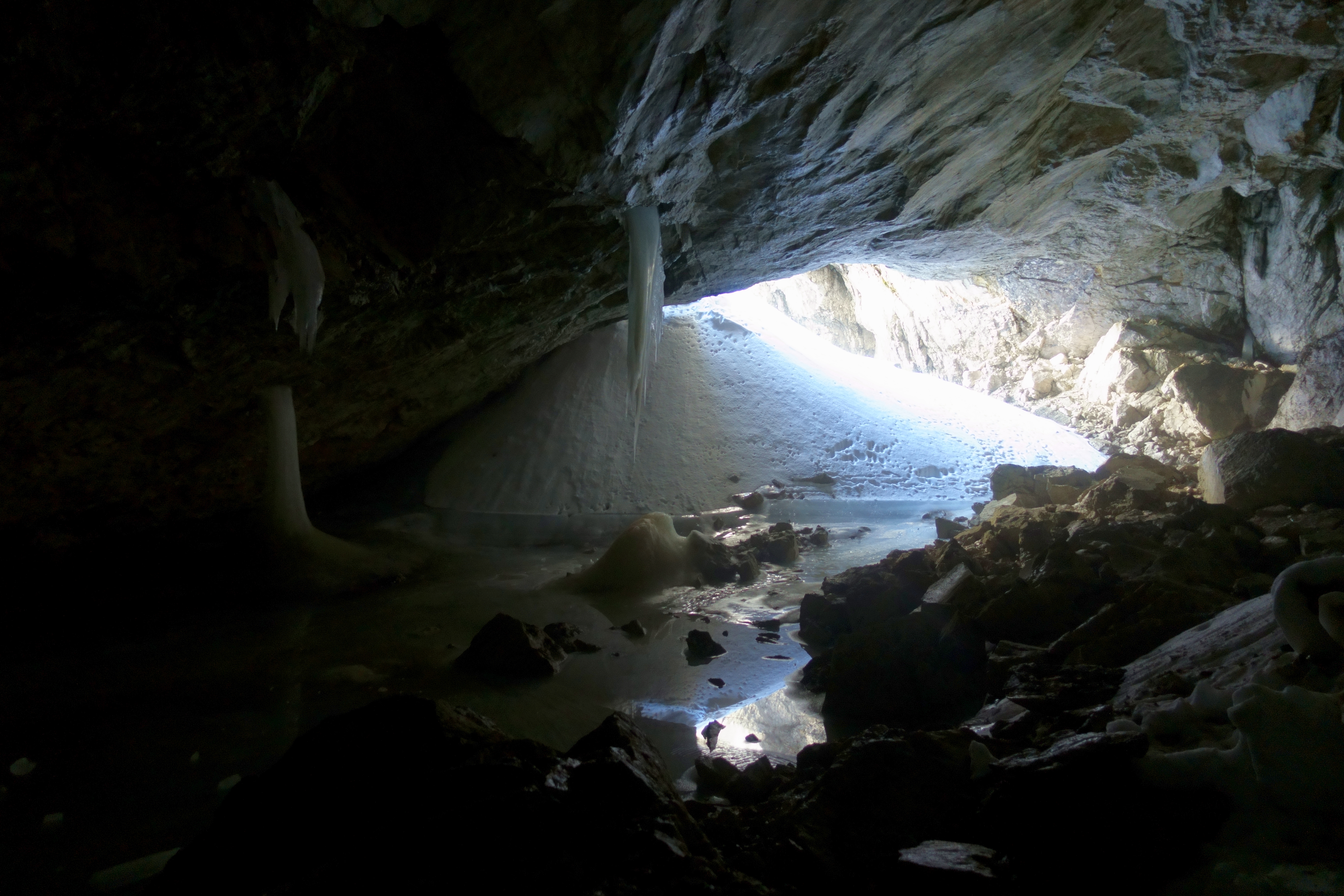 Eishöhle im Feuertal, Totes Gebirge, Oberösterreich. Die Höhle ist ein Zugang zum Schönberg-Höhlensystem